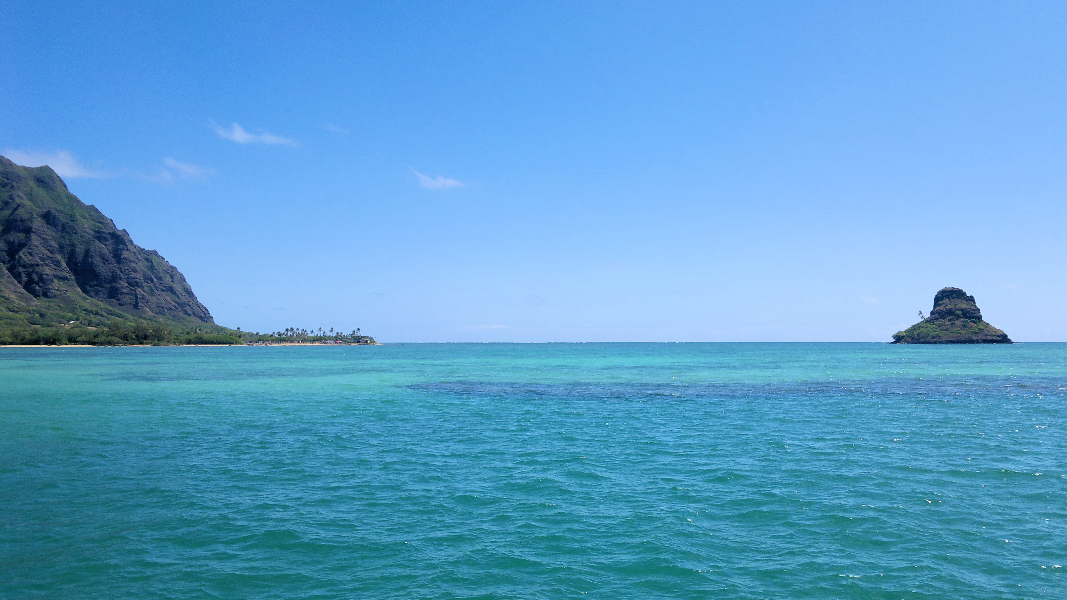 Die kleine Mokoliʻi Insel auf der rechten Seite wird auch "Chinamans Hat" genannt.